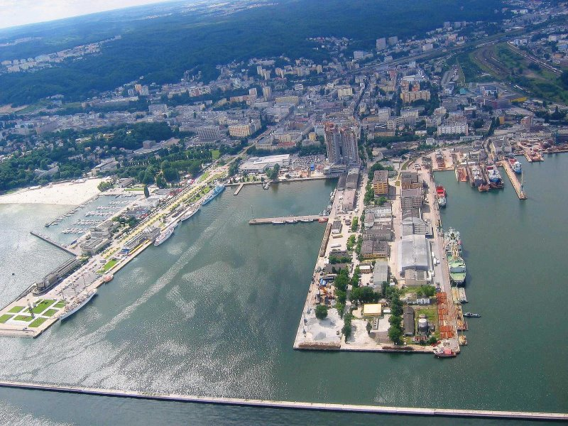 Gdynia. Strefa prestiżu miejskiego.